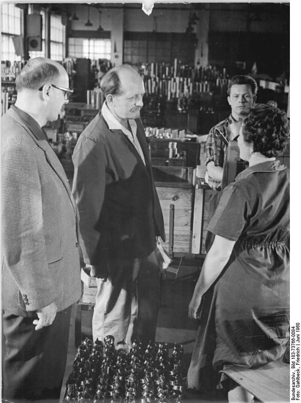 Zentralbild Gahlbeck 13.6.1960 2. Arbeiterfestspiele des FDGB. Schriftsteller-Treffen im Wälzlagerwerk Fraureuth. Ein Schriftsteller-Treffen mit über 20 bekannten Schriftstellern der DDR fand am 10.6. und 11.6.1960 im VEB Wälzlagerwerk Fraureuth statt. Die Schriftsteller besuchten einzelne Brigaden des Betriebes und unterhielten sich mit den Arbeitern. UBz: In der Abteilung Hauptmontage unterhält sich Erwin Strittmatter mit der Montagearbeiterin Charlotte Poser und dem Technischen Leiter Fröse.